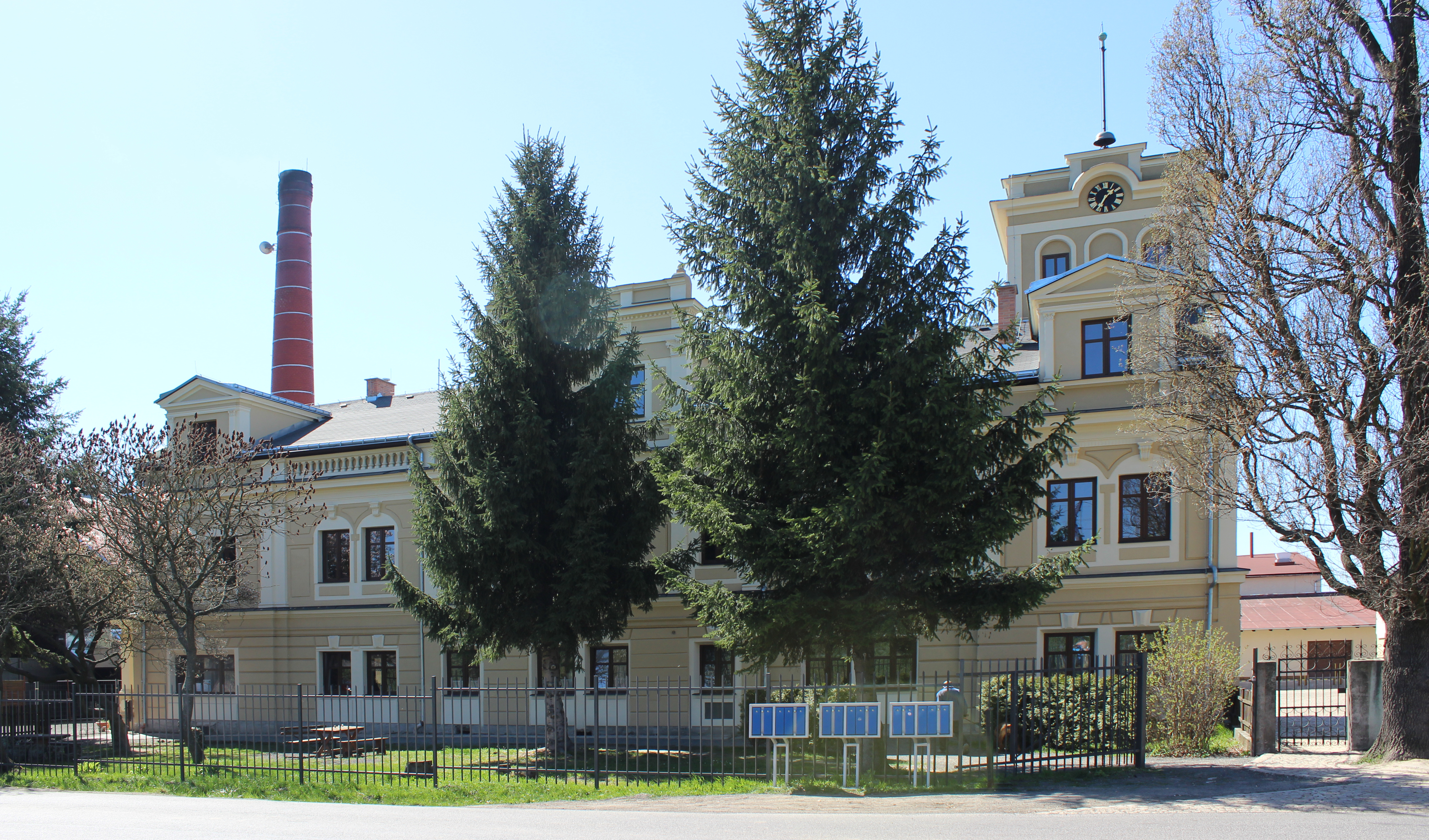 Zámeček v Malém Rohozci, části Turnova.